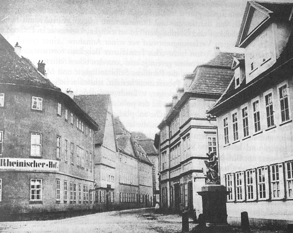 Erfurt: Rheinischer Hof, um 1900. Ecke Regierungsstraße/Lange Brücke. Ehemals Schlehdorn.